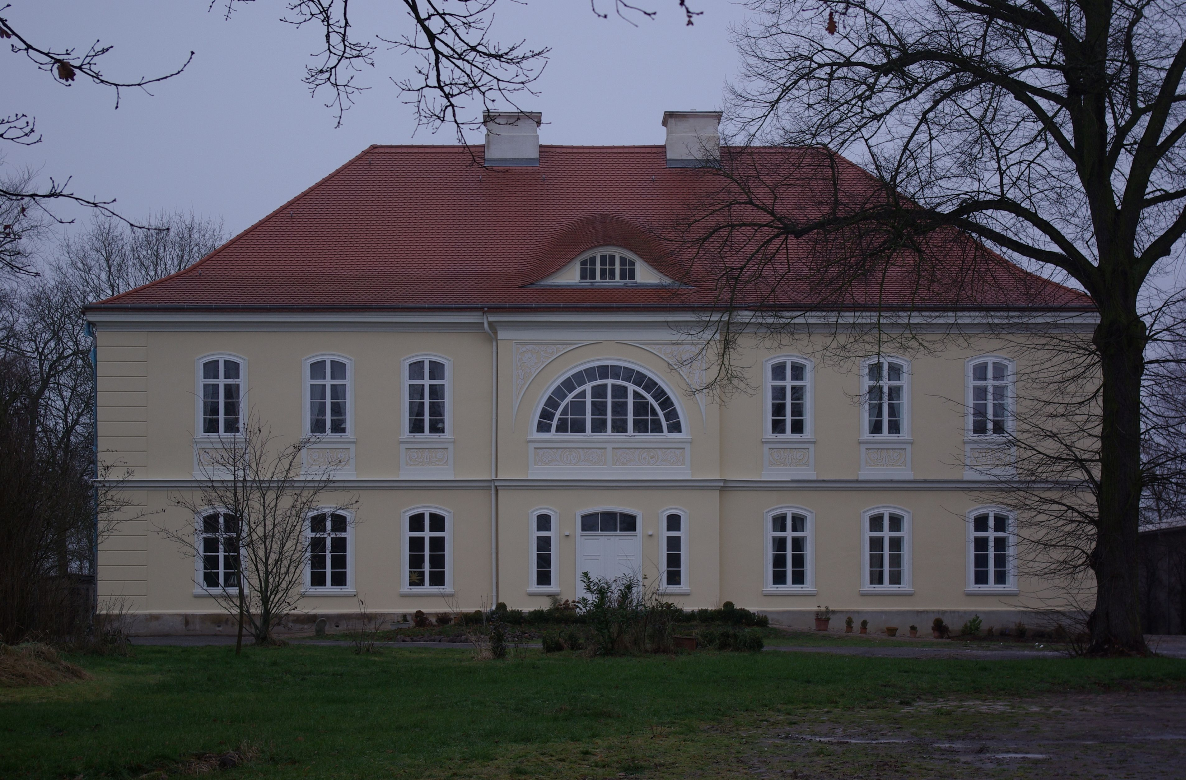 Jocobsdorf Ortsteil Sieversdorf in Brandenburg. Das Gutshaus in der Gärtnerstraße 4 steht unter Denkmalschutz.